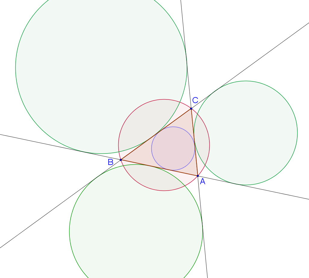 файл создан в среде GeoGebra